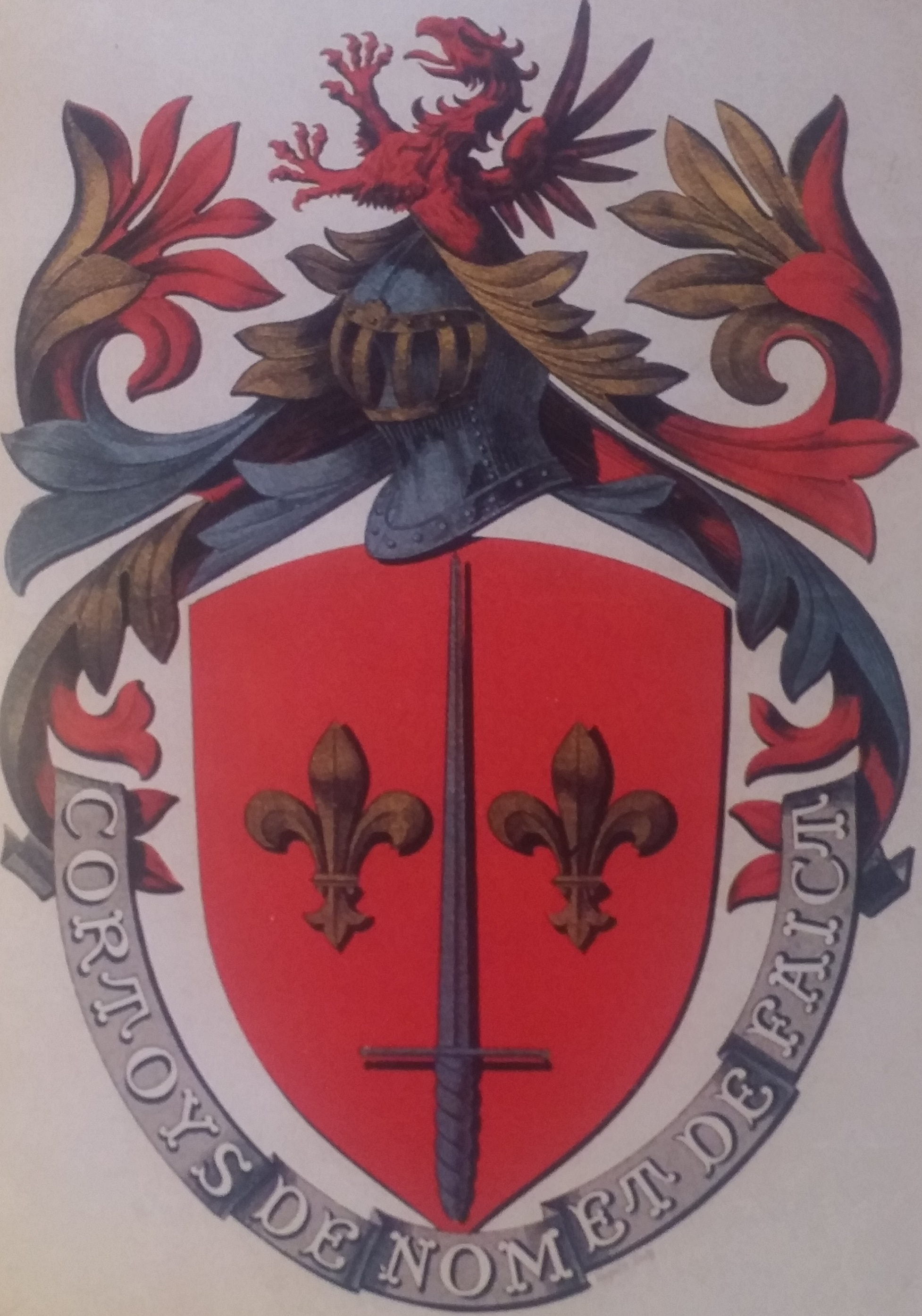 Avant la bataille de Pavie, les Cortoys d'Arcollières portaient d'or au griffon de gaules. Par concession du roi François 1er, auquel Etienne Cortoys sauva deux fois la vie à la bataille de Pavie, ils portèrent depuis : de geules à l'épée d'argent, accostée de deux fleurs de lis d'or.